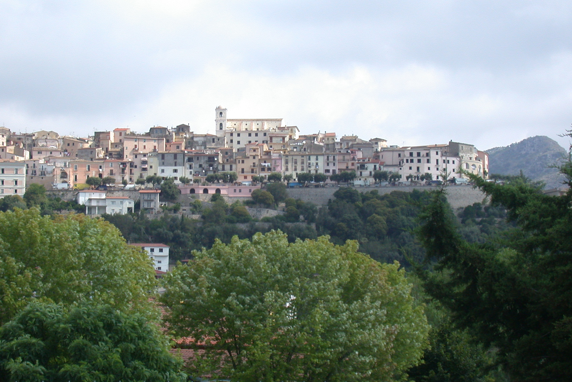 Monte San Biagio (provincia di Latina, Lazio, Italia), panorama dalla via Appia.